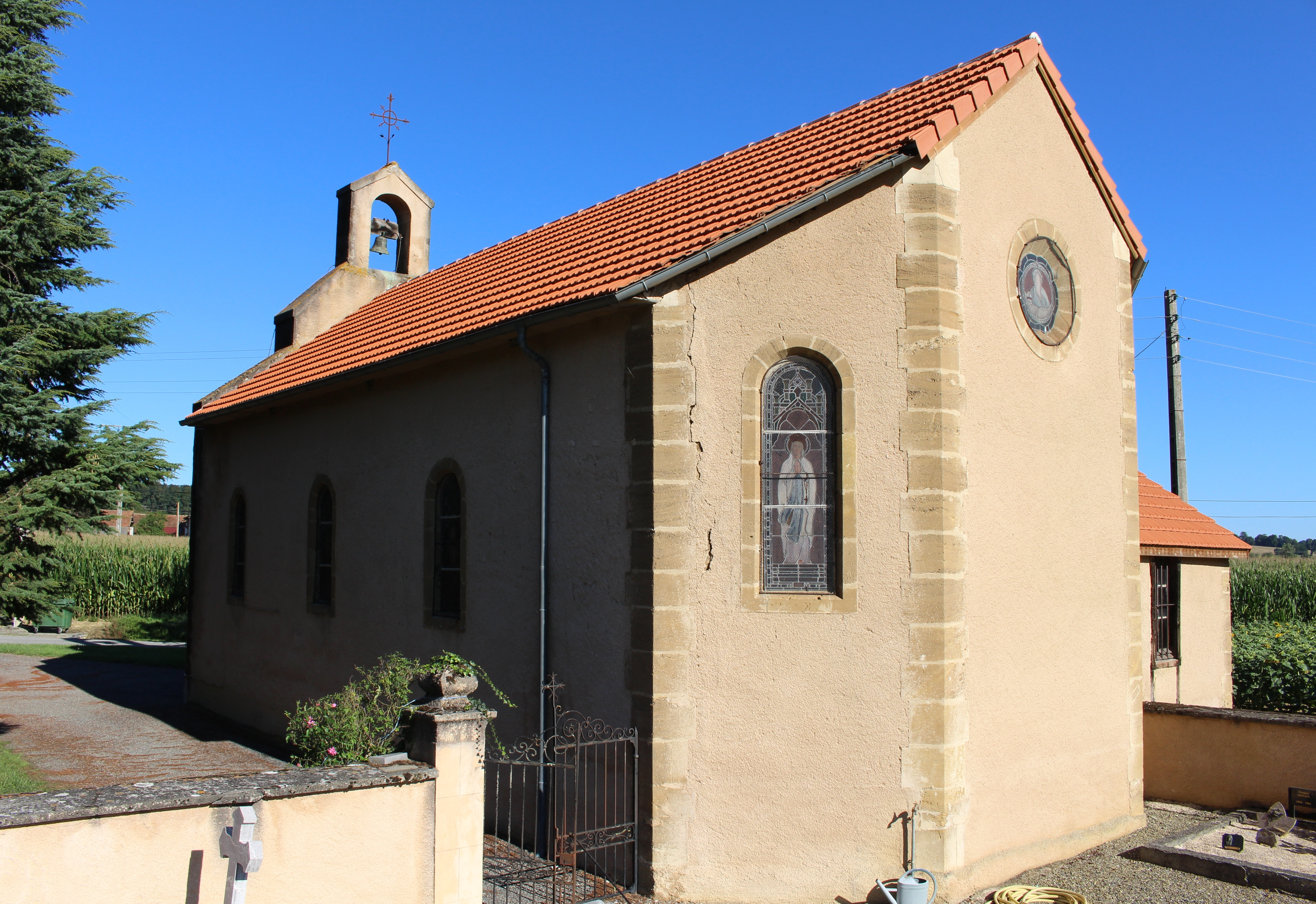 Église Saint-Exupère de Barthe (Hautes-Pyrénées)